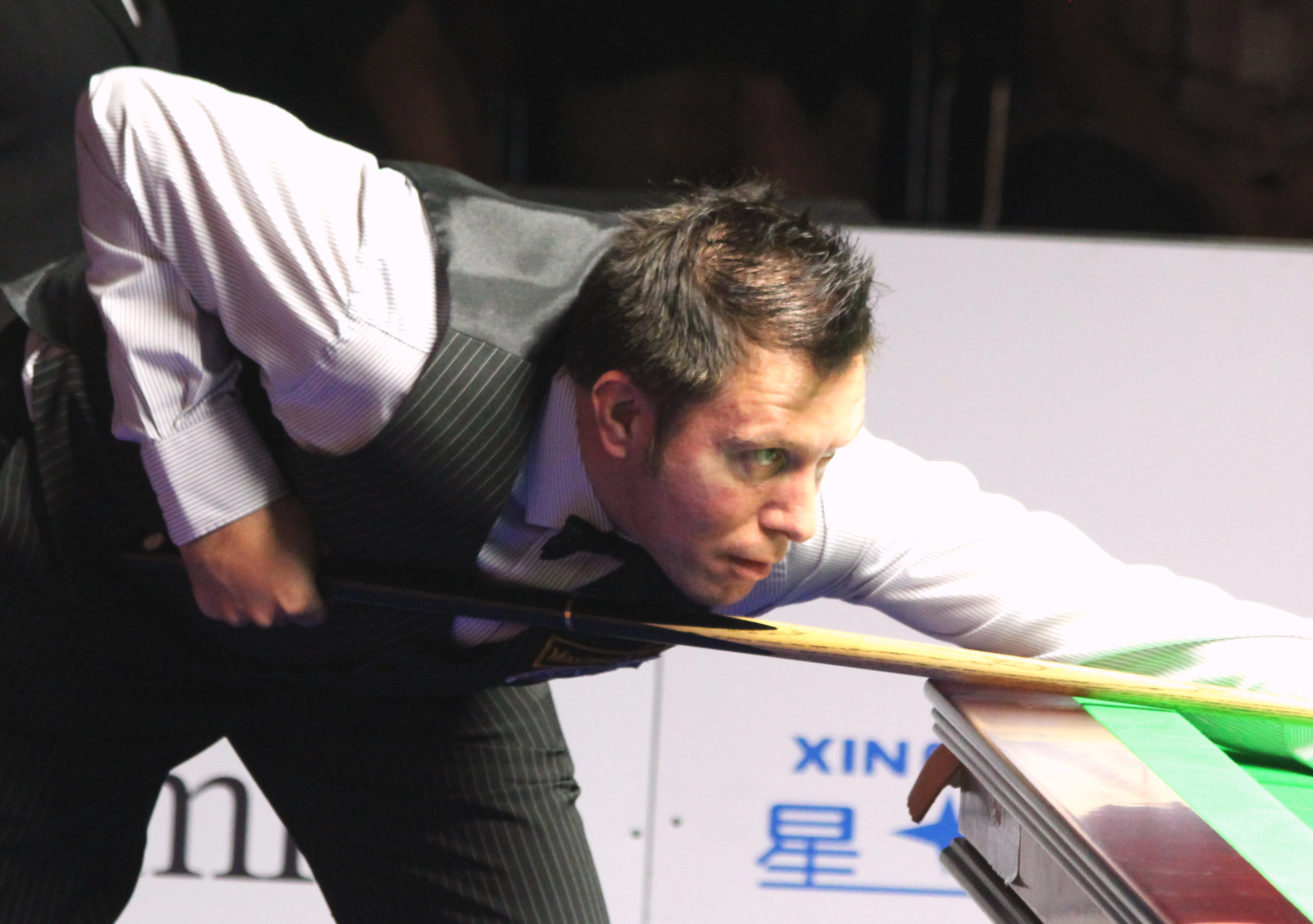 Dominic Dale beim Paul Hunter Classic 2016